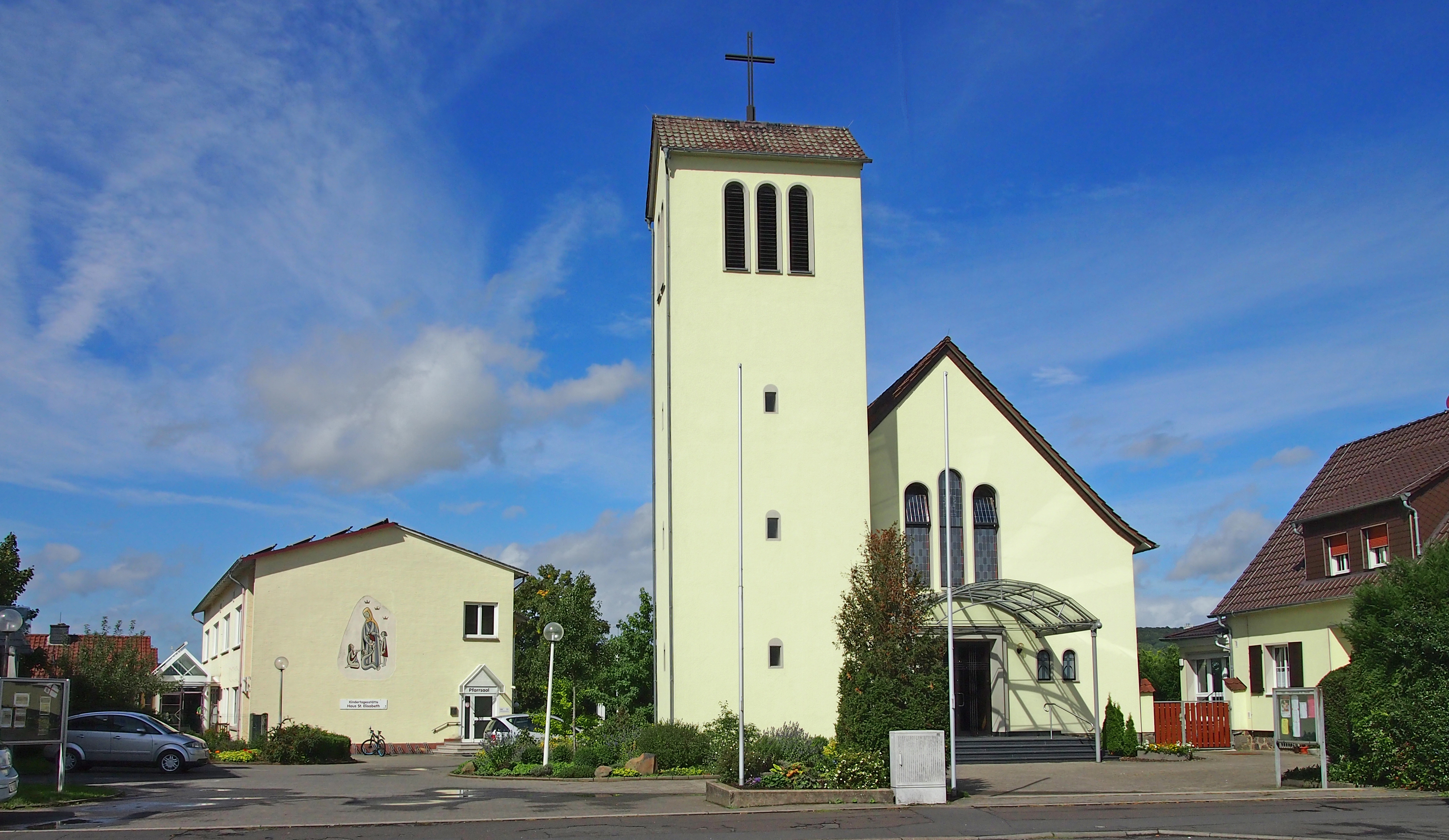 Katholische Kirche in Großen Buseck